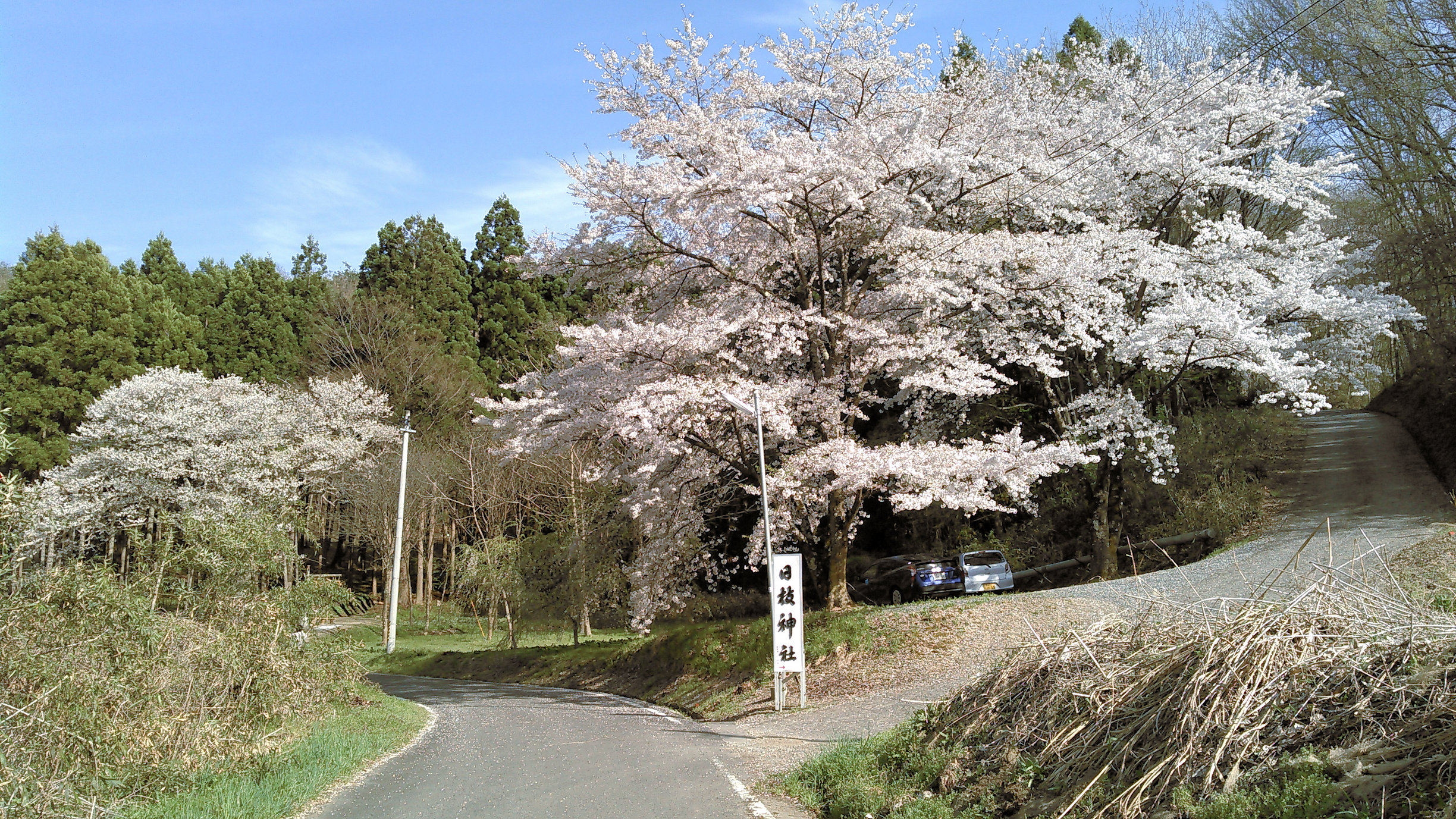 郡山市西田町三町目の日枝神社 西参道入口、桜のシーズン。奥が山王桜。